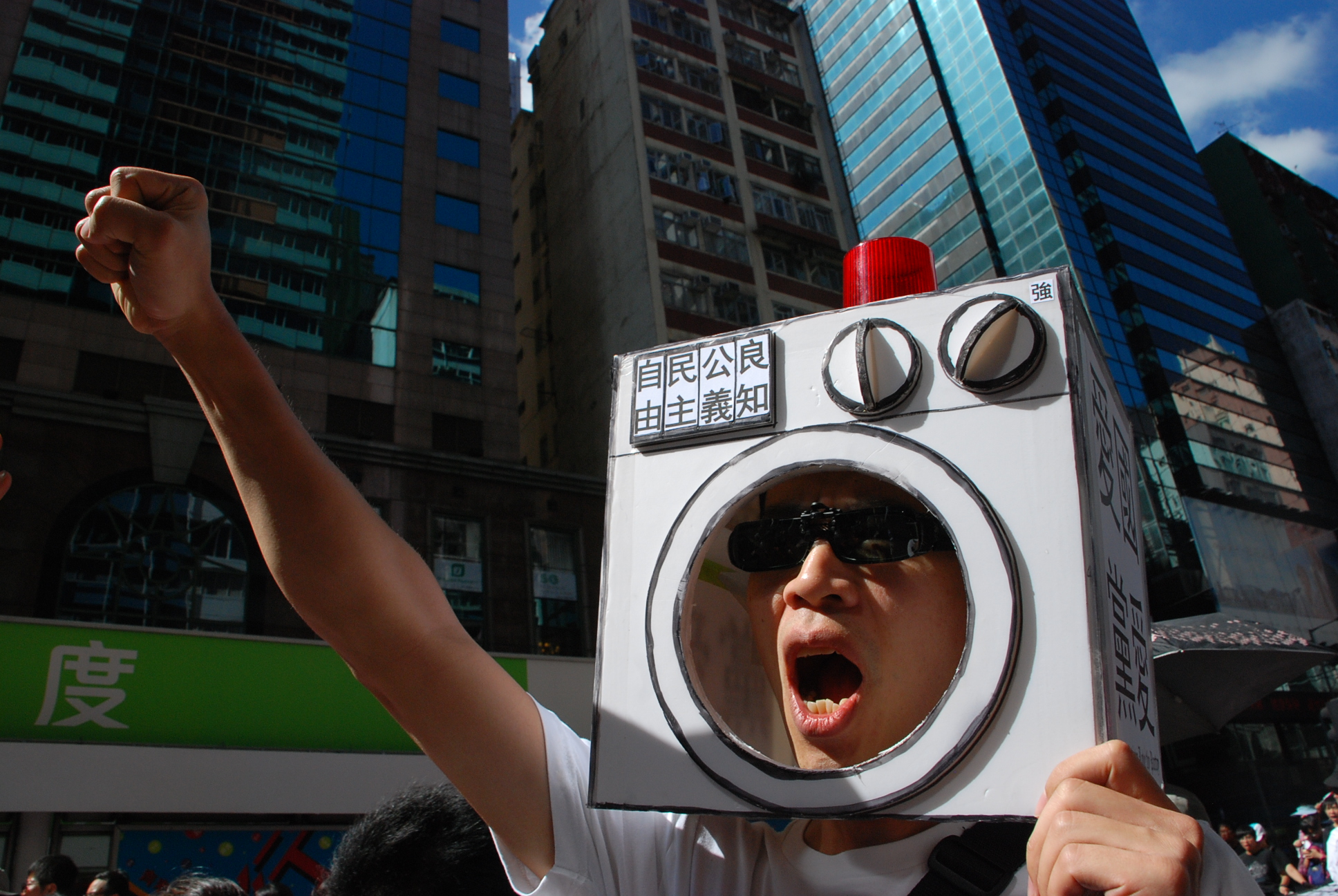 視覺藝術家黃國才戴上自製的「洗衣機頭盔」諷刺國民教育的洗腦功能。